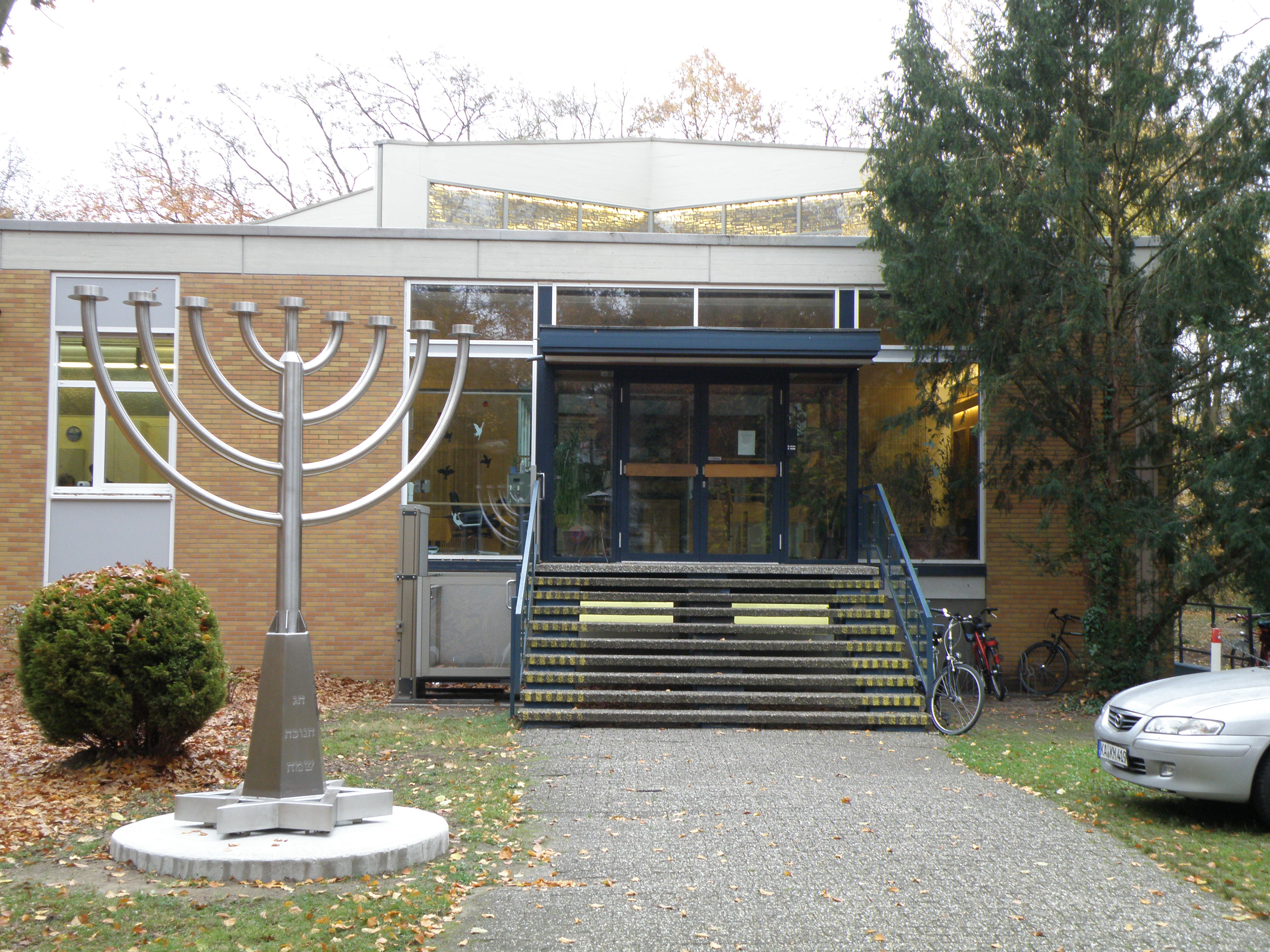 Karlsruhe-Synagoge-2011 - PB140110